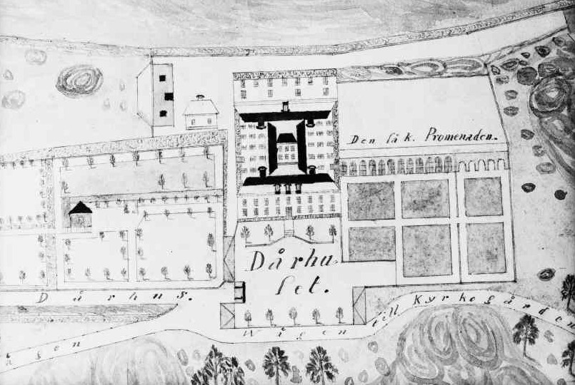 Plankarta över dårhuset (Danvikens Hospital) med omgivningar från 1848